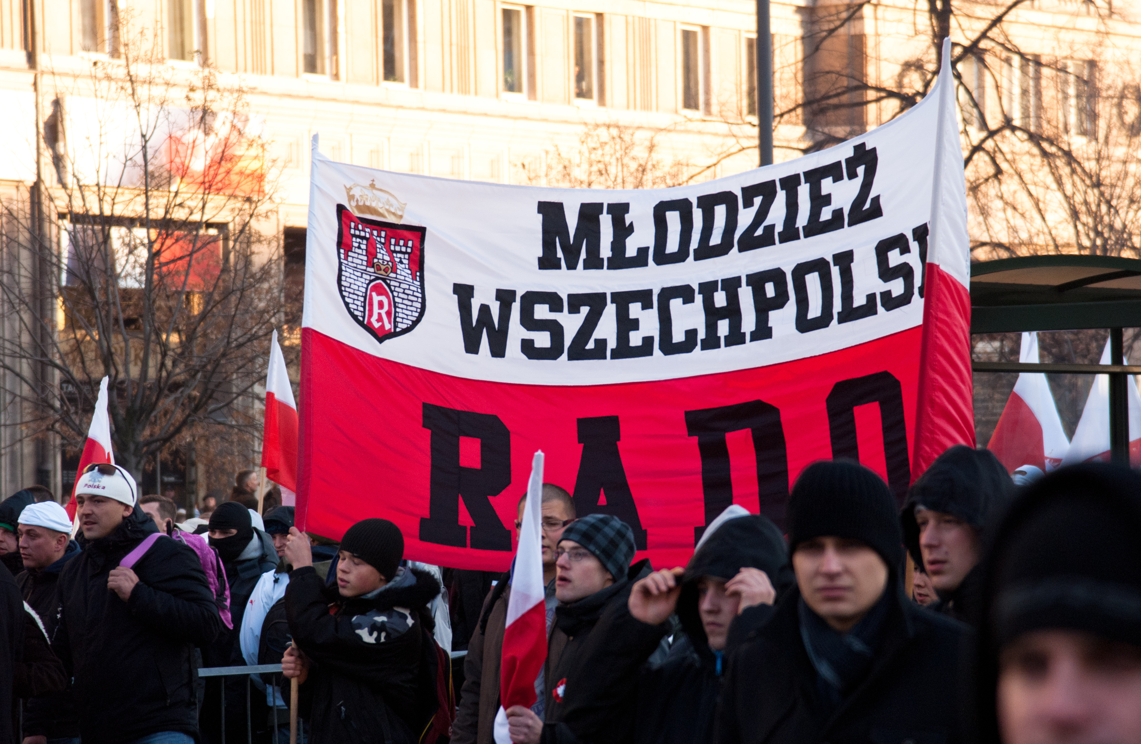 Warszawa, Marsz Niepodległości 2011, Plac Konstytucji